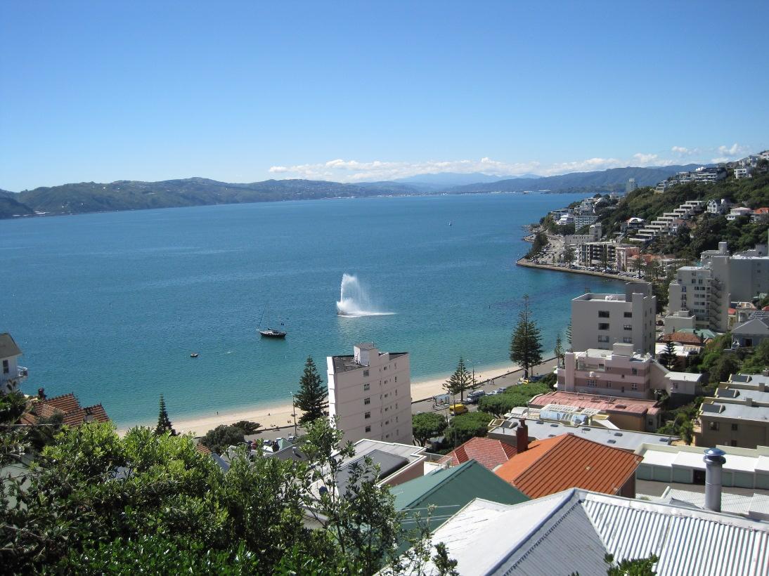 Vue du Mount Victoria